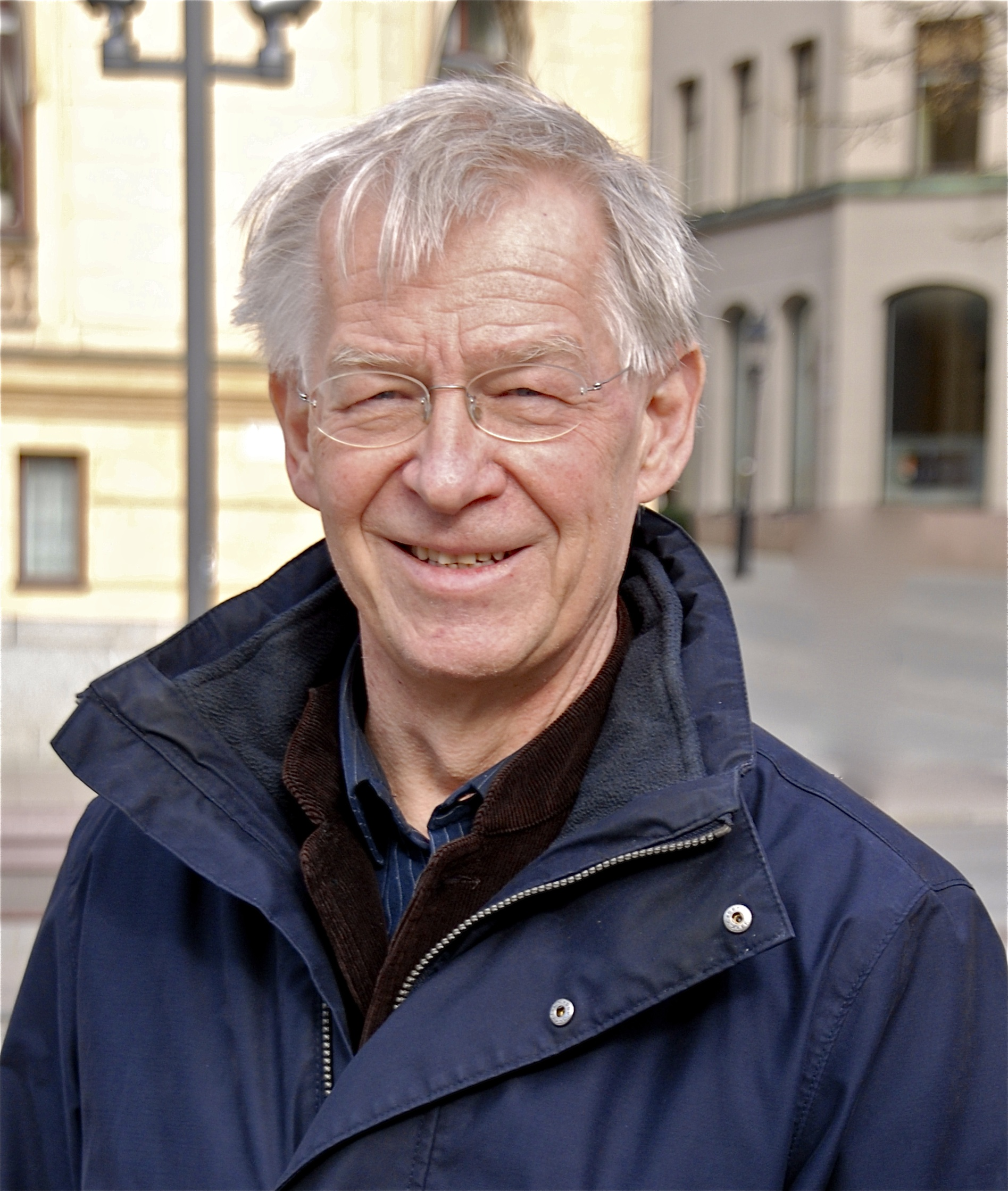 Anders Wahlgren i Kungsträdgården Stockholm 2012.